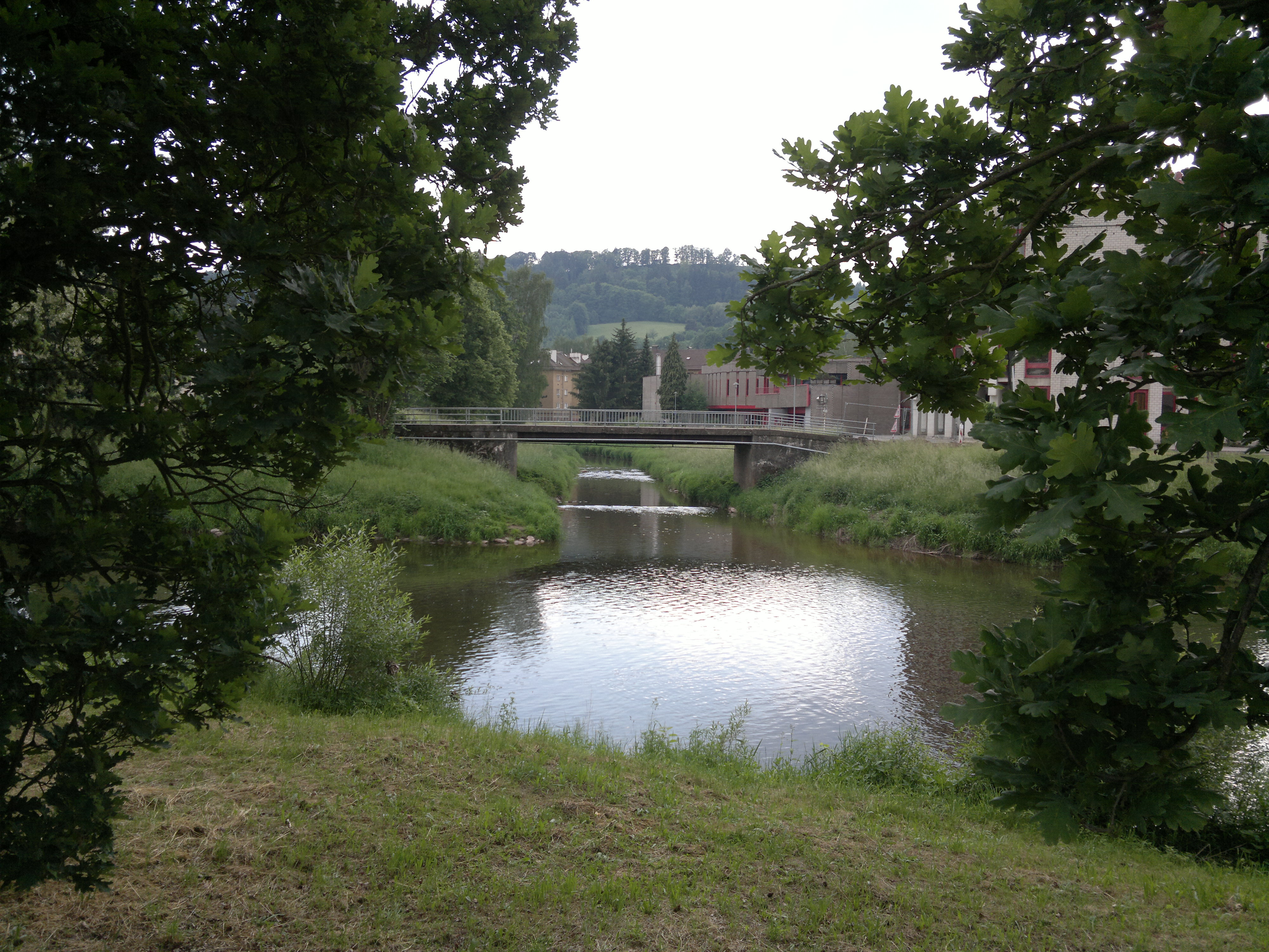 Ústí Olešky do Jizery v Semilech